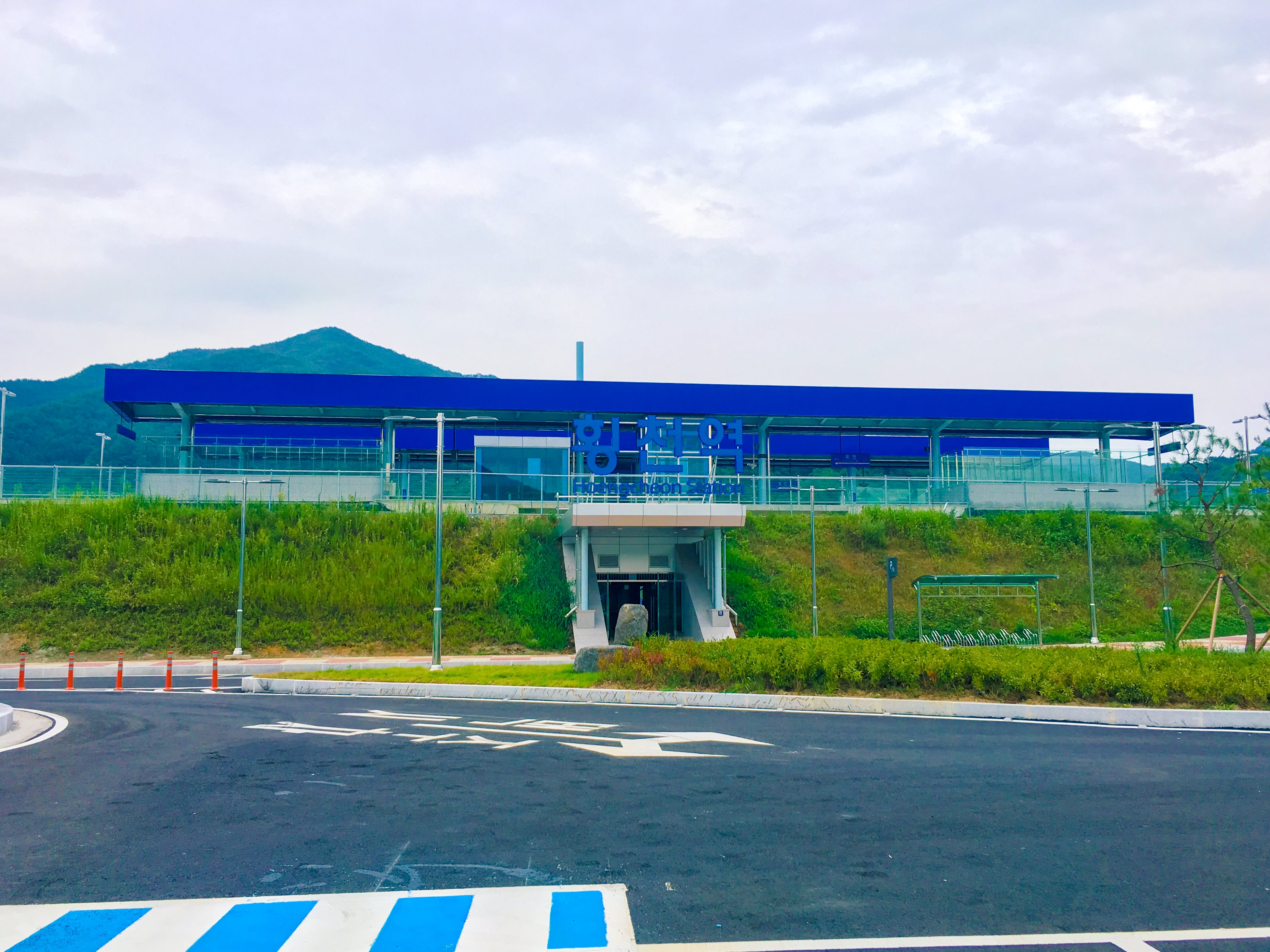 횡천역 역사